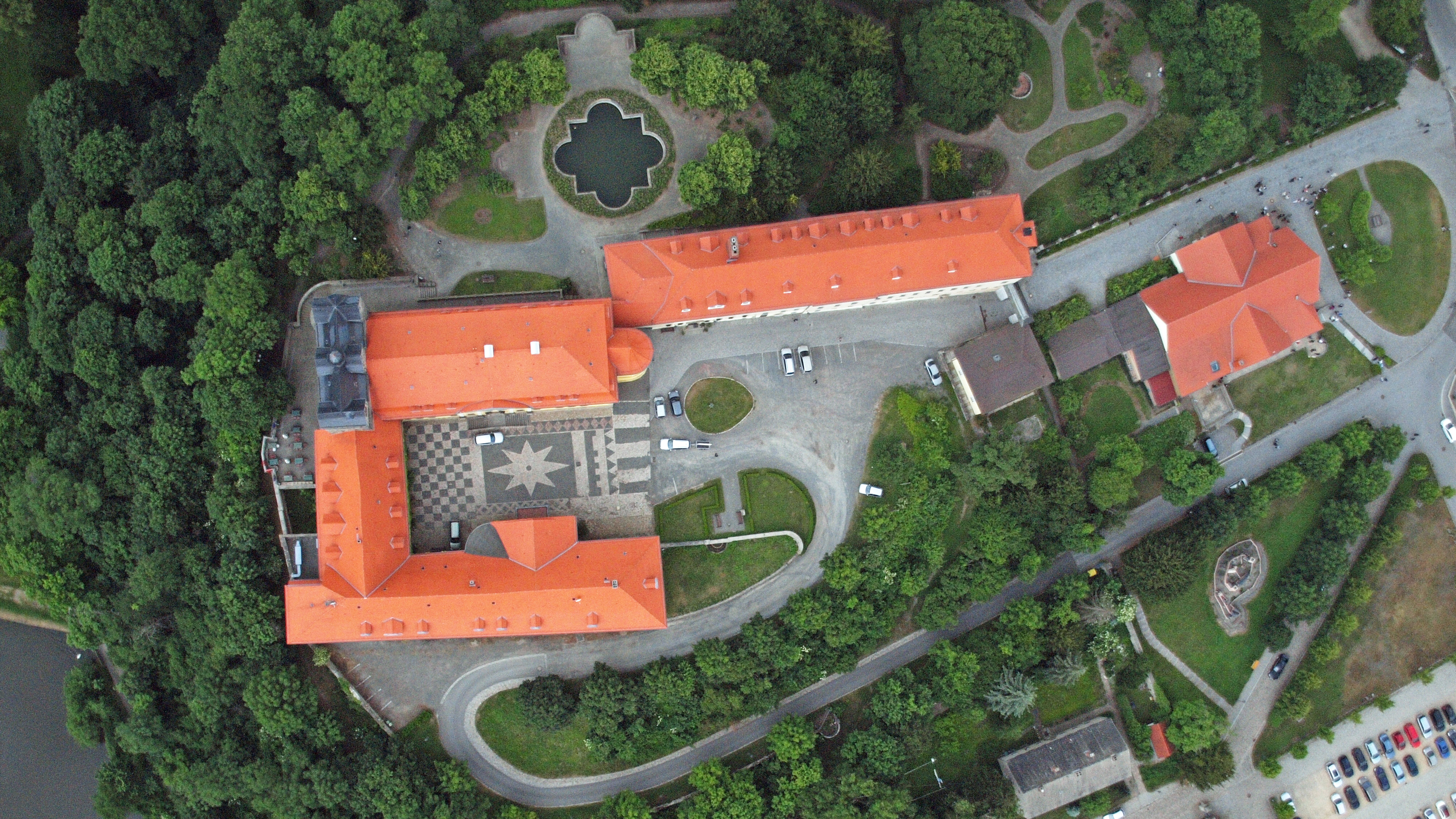 Schloss Ballenstedt, Ballenstedt: Senkrechtaufnahme